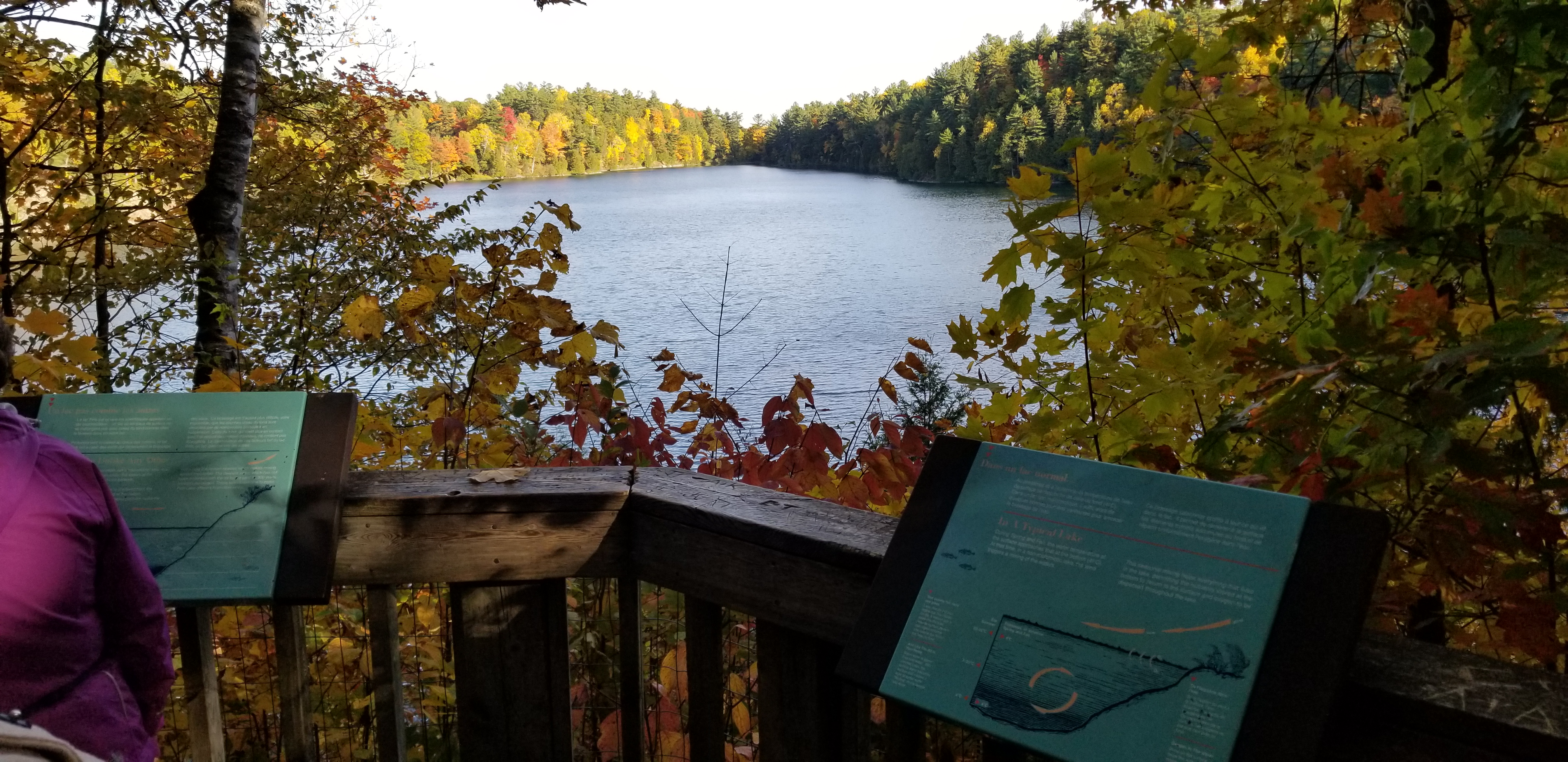 Vue du lac à partir de la plate-forme d'observation